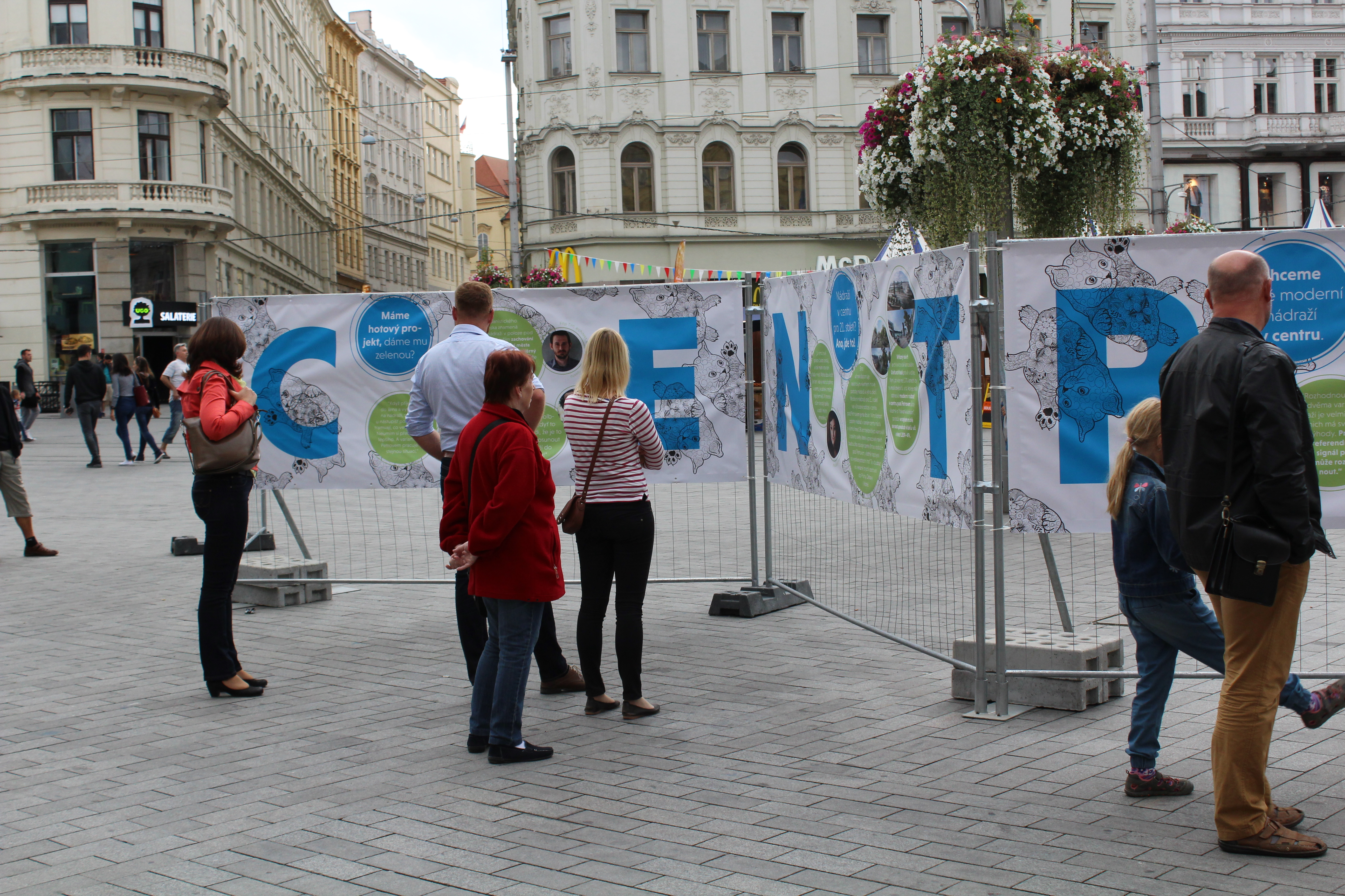 Návštěvníci náměstí Svobody prohlížejí předreferendovou výstavku